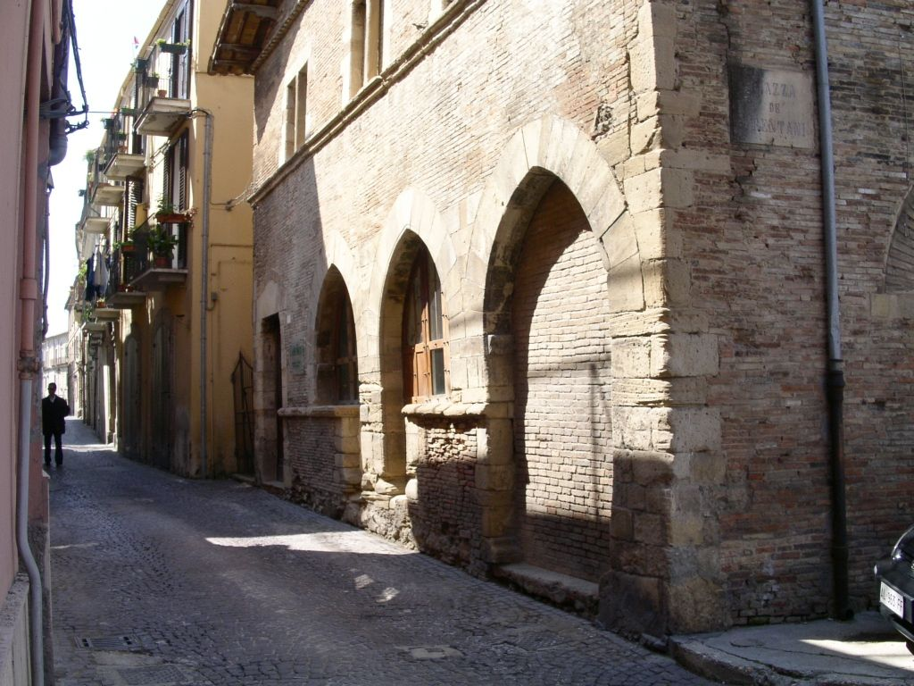 Botteghe Medioevali in Via dei Frentani. Foto scattata da me. Lanciano (CH), 7 aprile 2007.